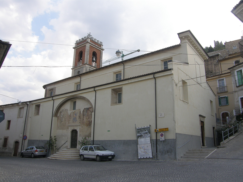 Vittorito